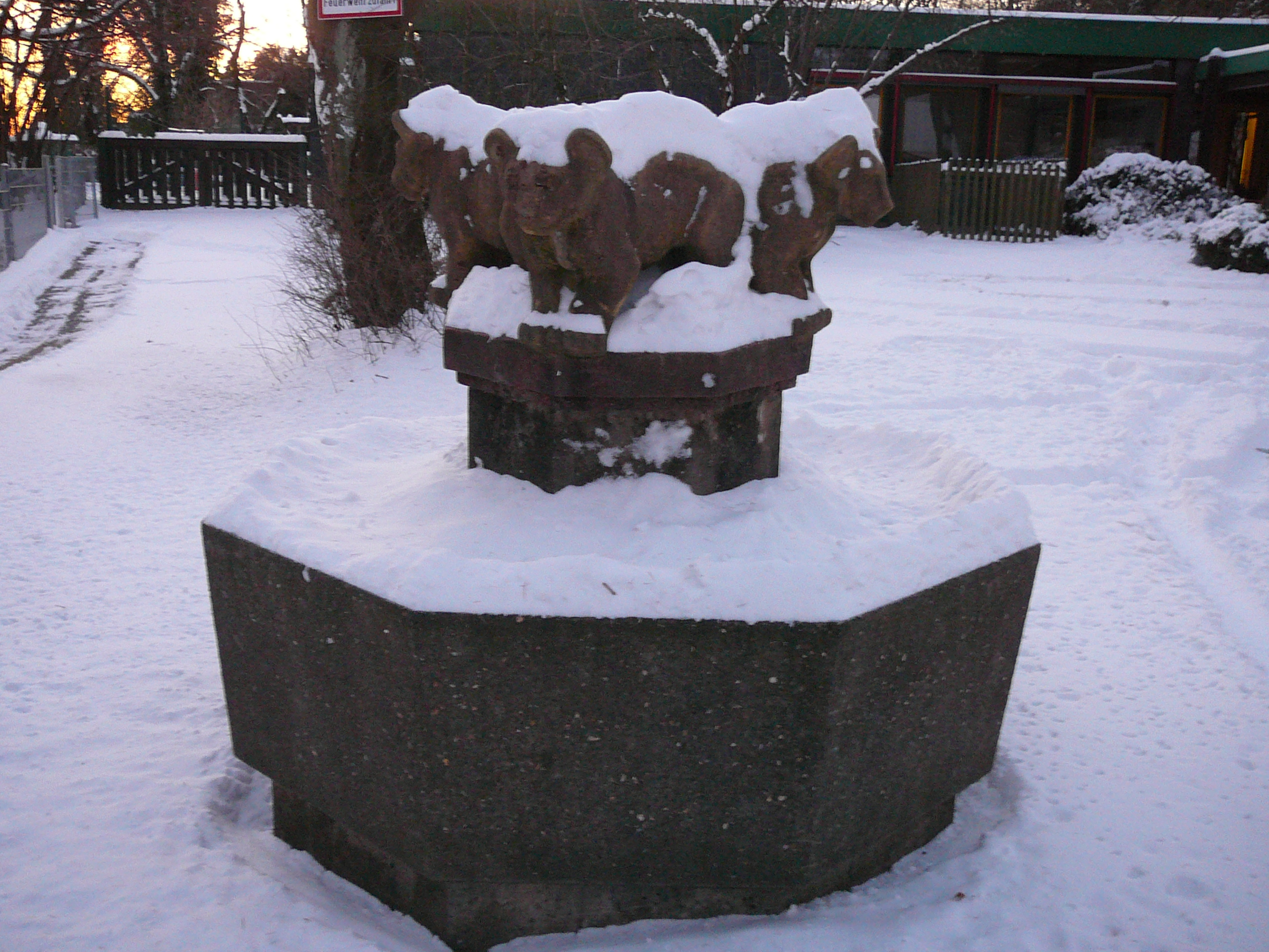 Melanchthonstraße, Wuppertal